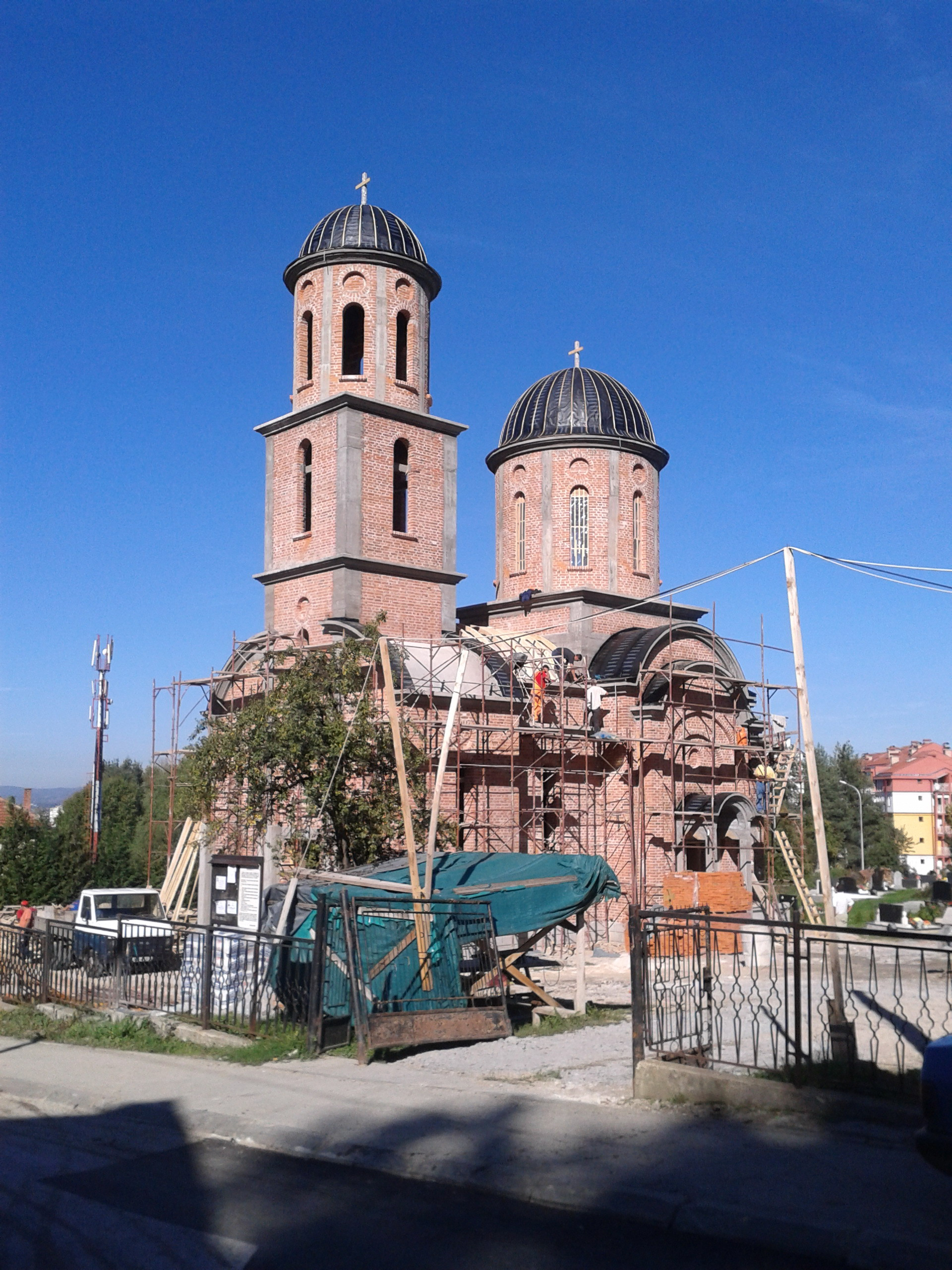 Изградња православне цркве на Старчевици (Бања Лука)